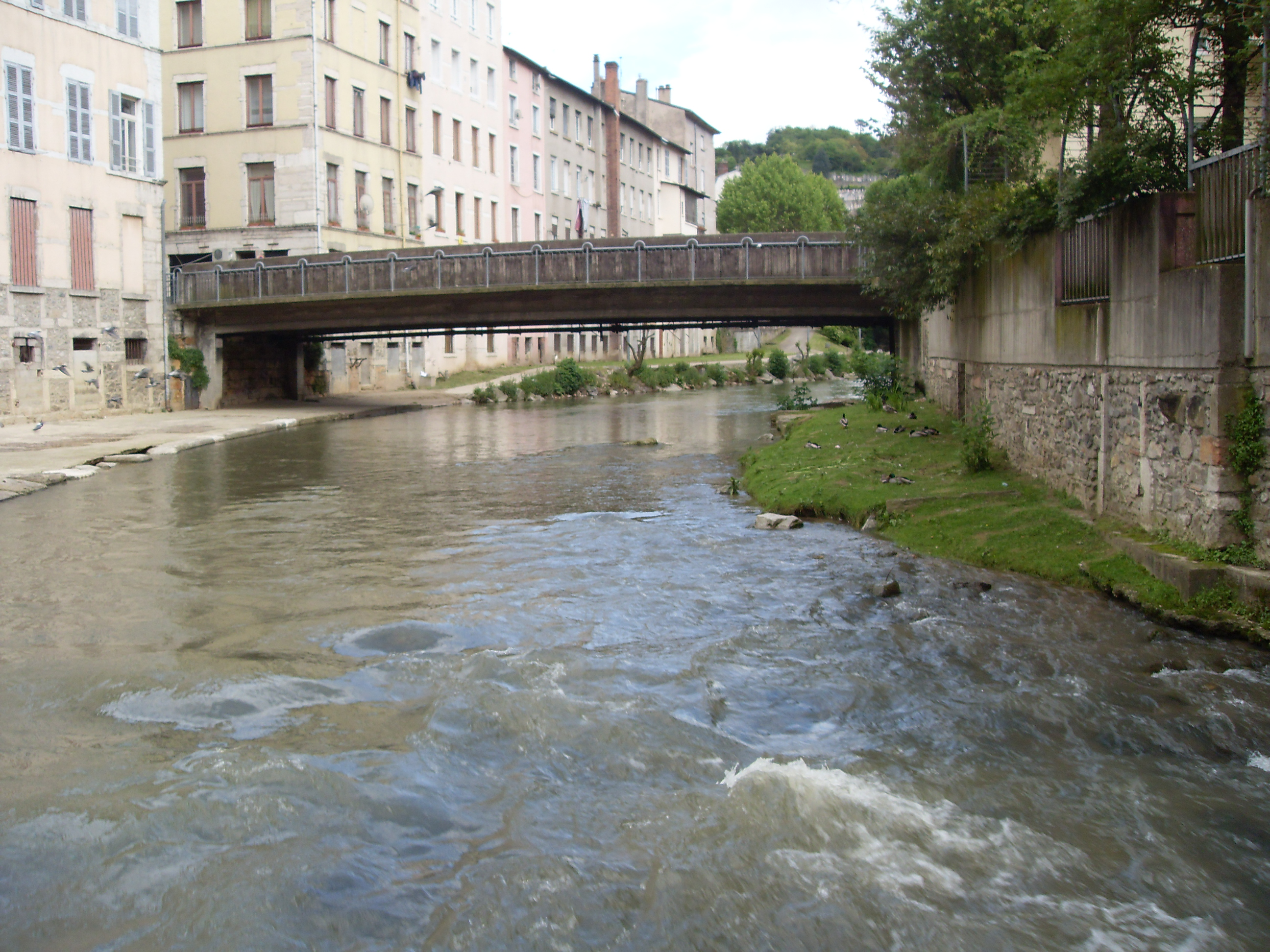 La rivière de la Gère à Vienne, Isère, France.